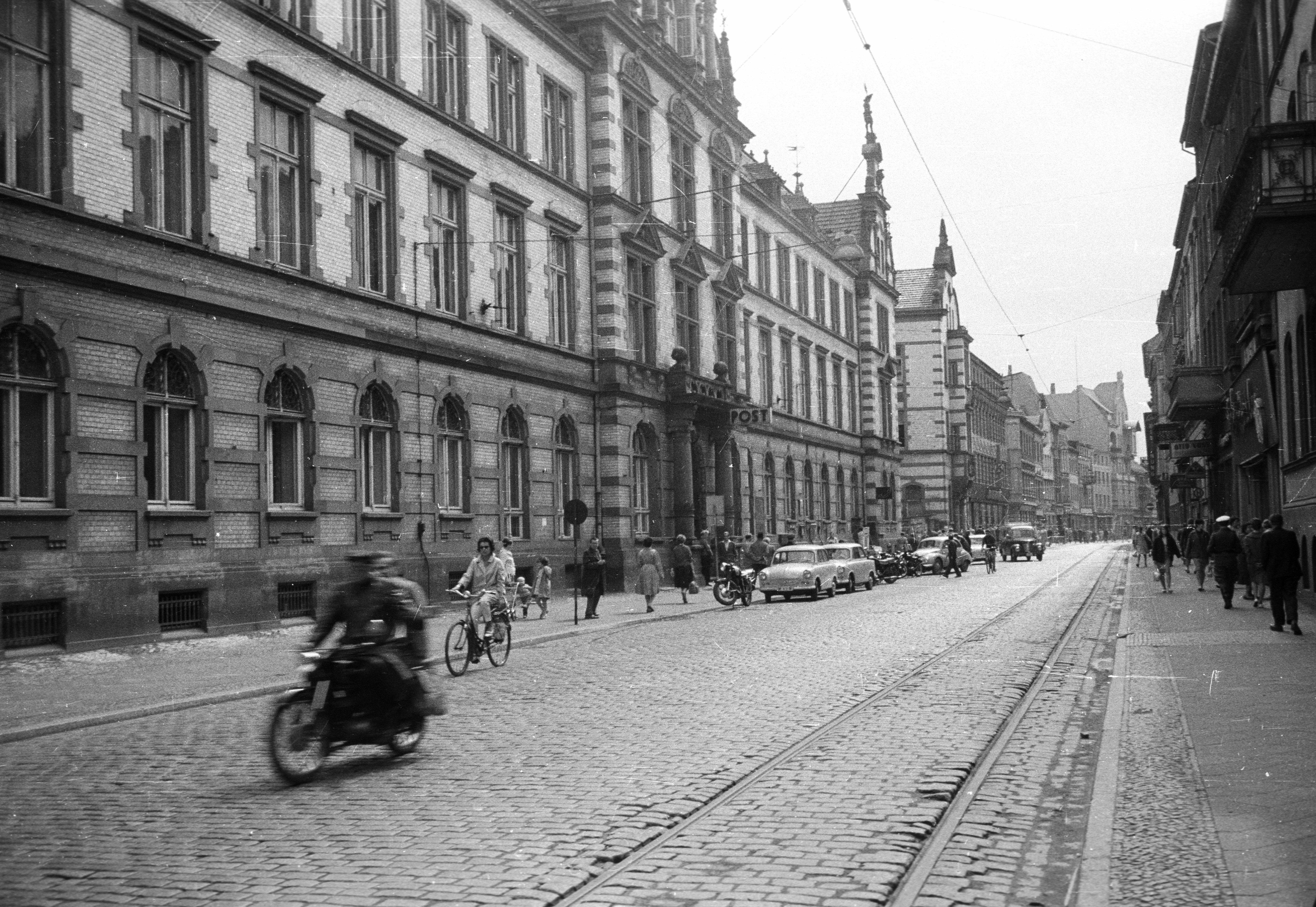 Strasse der Nationalen Einheit (Mecklenburgstrasse), balra a Főposta.